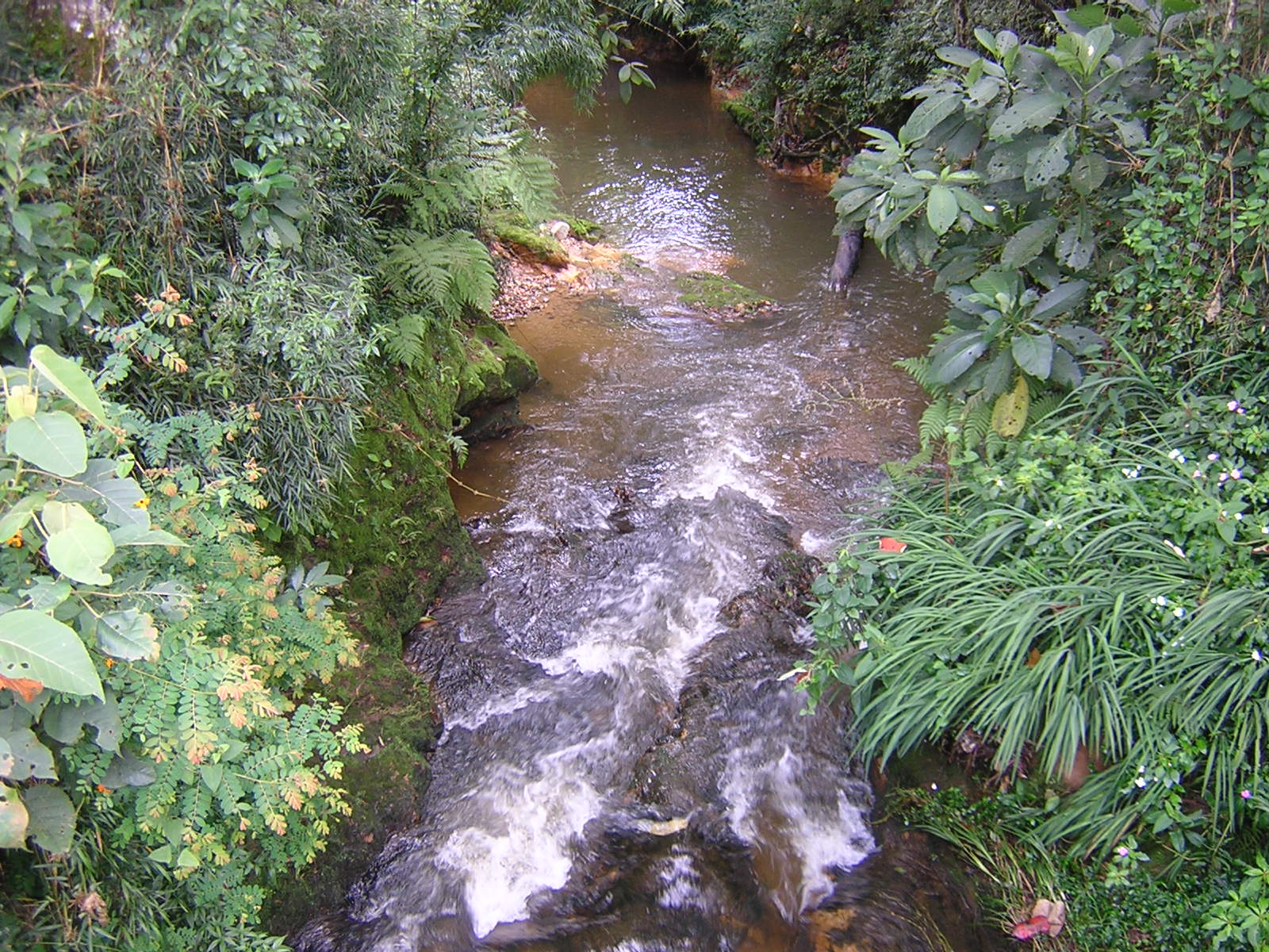 Quebrada Santa Elena, foto tomada en el Corregimiento de Santa Elena, Medellín, Colombia.